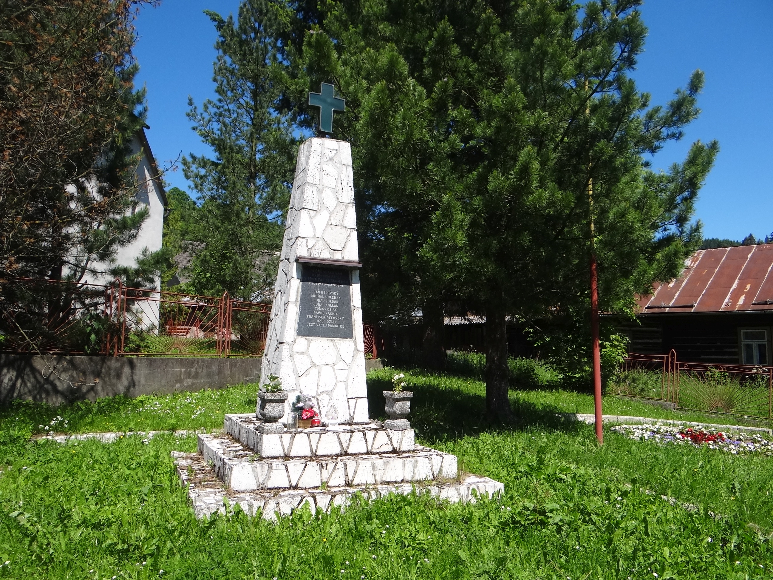 Kolačkov